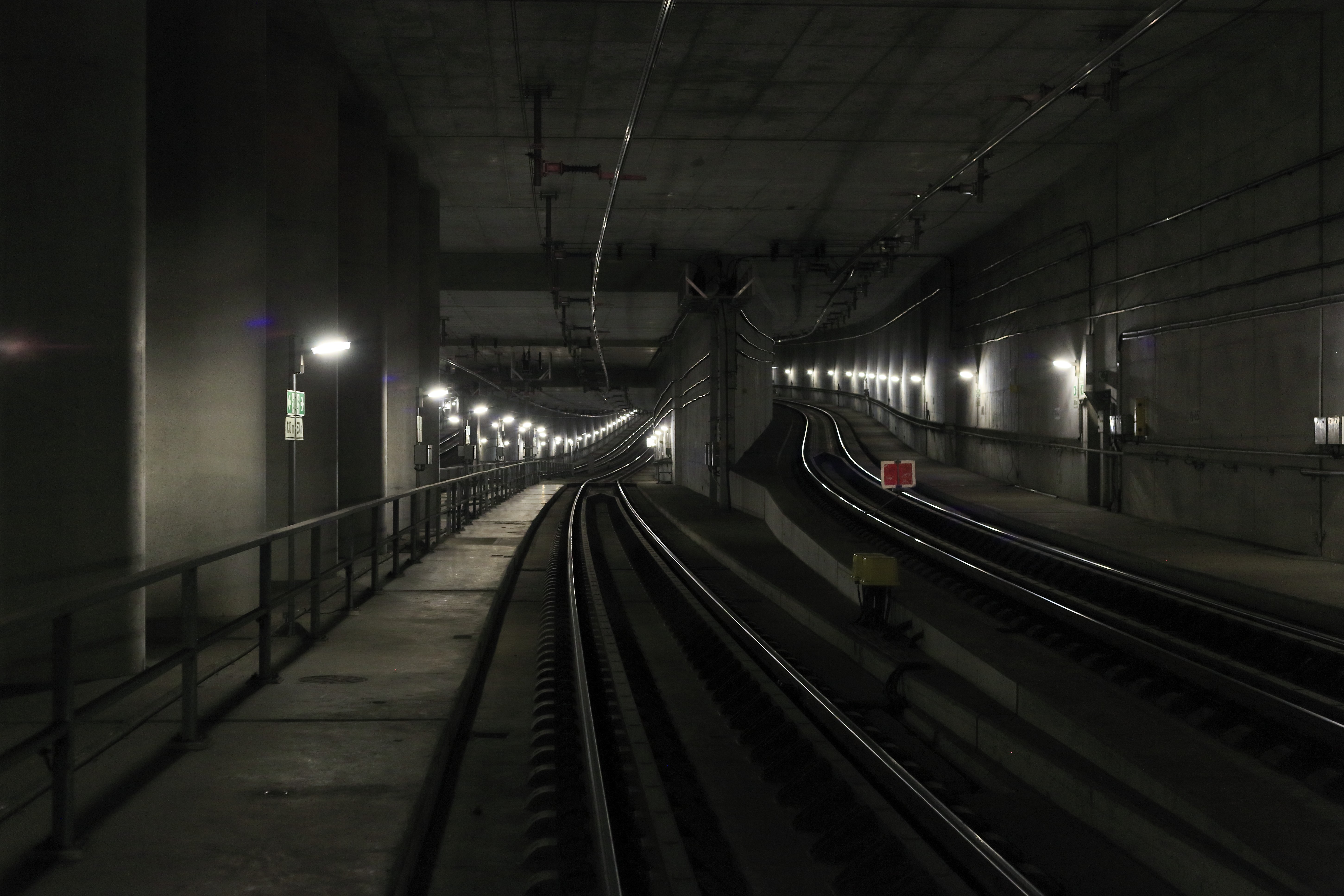 Links liegen die Streckengleise der Nord-Süd-Stammstrecke 6396, das rechte Gleis ist das Richtungsgleis Leipzig–Wahren der Strecke 6382. Für die niveaufreie Überwerfung mussten die Stammgleise vor der Tunnelrampe abgesenkt werden. Die Platten auf der linken Seite bilden die vorbereitete Bahnsteigverlängerung. Dass sie jemals genutzt wird, ist zum Aufnahmezeitpunkt unwahrscheinlich. Nicht nur, dass es keine Planungen für einen Fernverkehr Richtung Hof gibt, es mangelt auch an freien Fahrplantrassen. Die Sh-2-Scheibe im rechten Gleis ist baustellenbedingt, zum Aufnahmezeitpunkt wird bei der Weiche 198 eine halbe Zungenvorrichtung gewechselt.